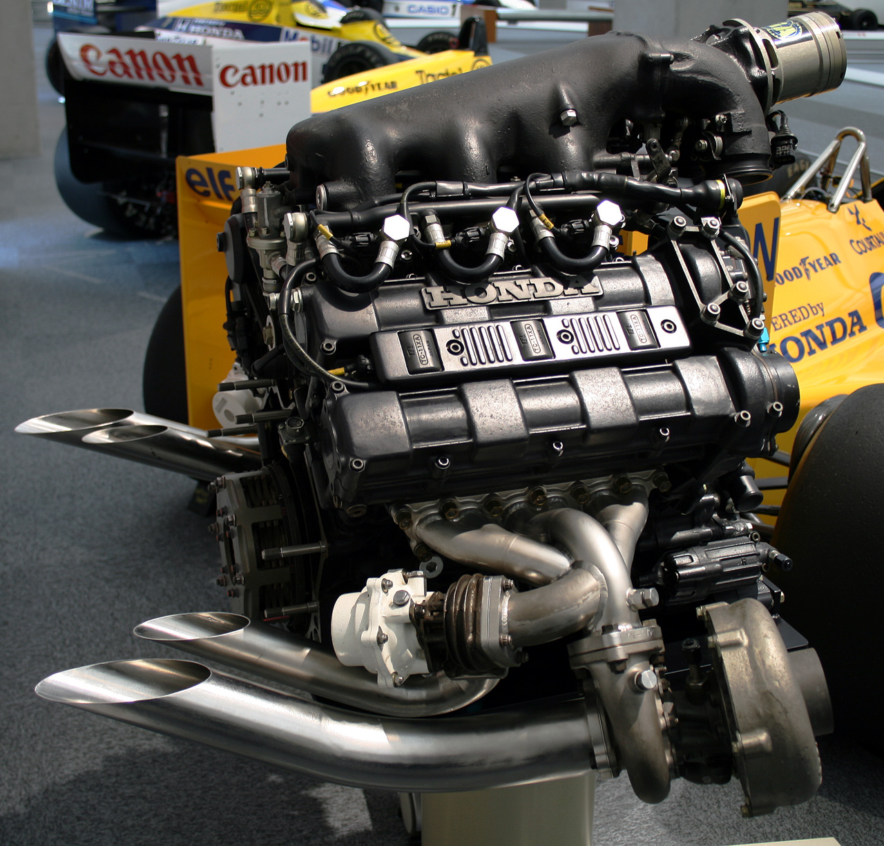 Honda RA168E engine (Formula One)